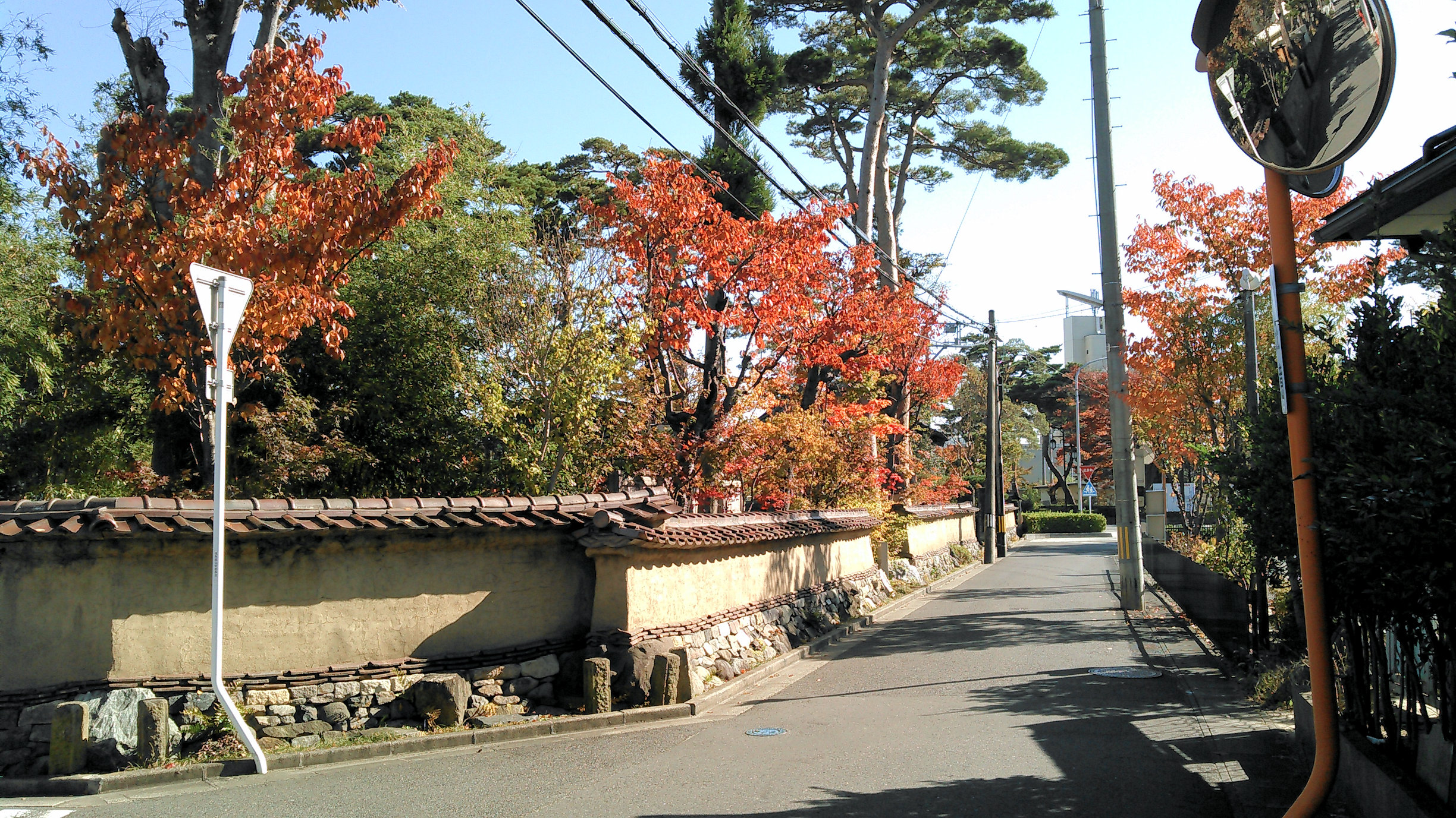 郡山市 道因寺 土塀付近 秋の様子